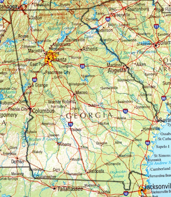 Referenzkarte des US-Bundesstaates Georgia